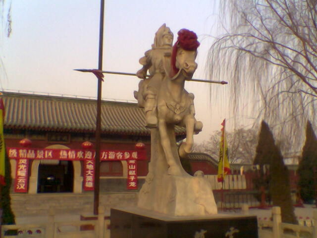 河北省石家庄市正定县赵云庙（利用手机上的照相机摄于2005年12月19日下午）